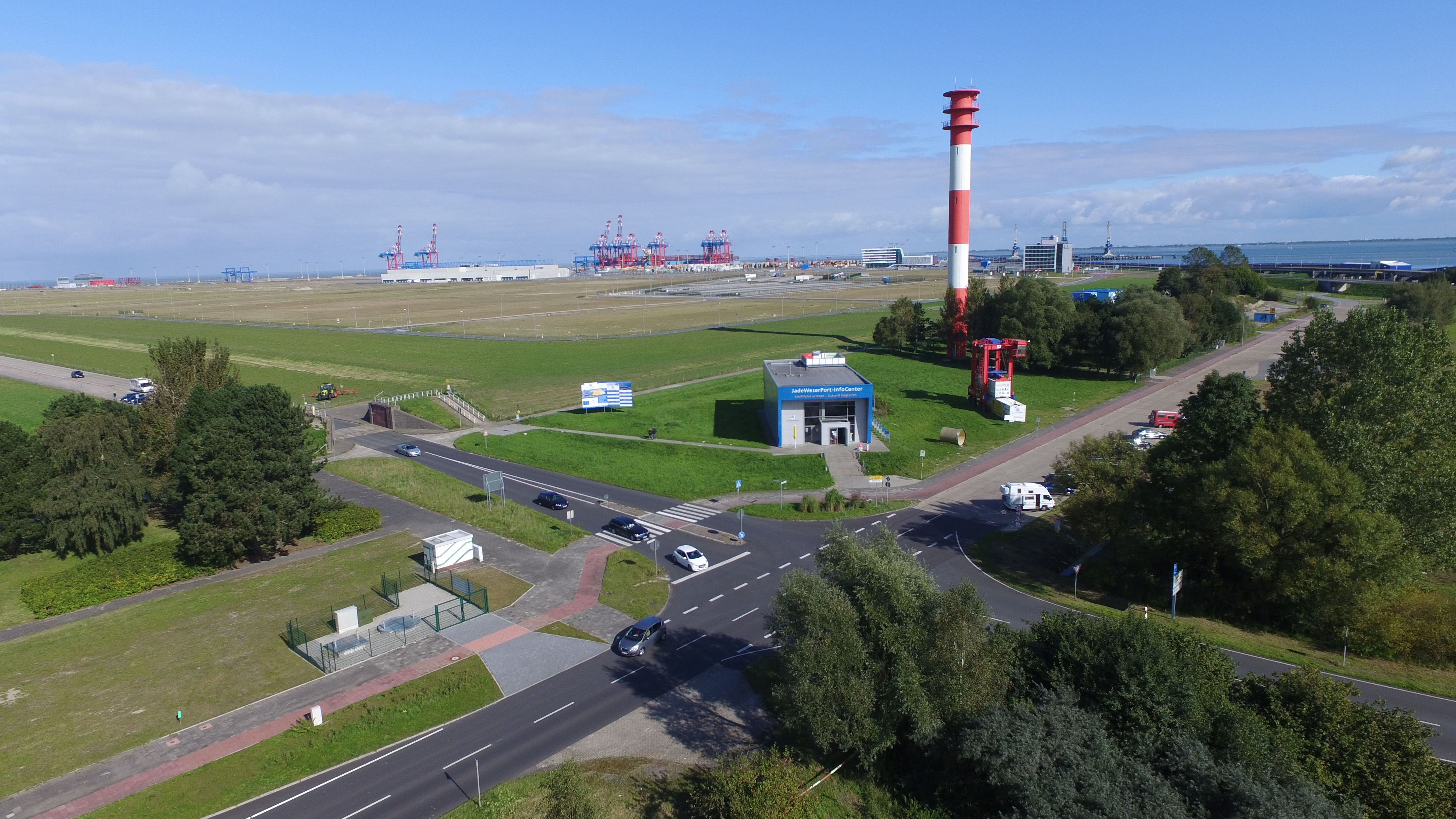 JadeWeserPort